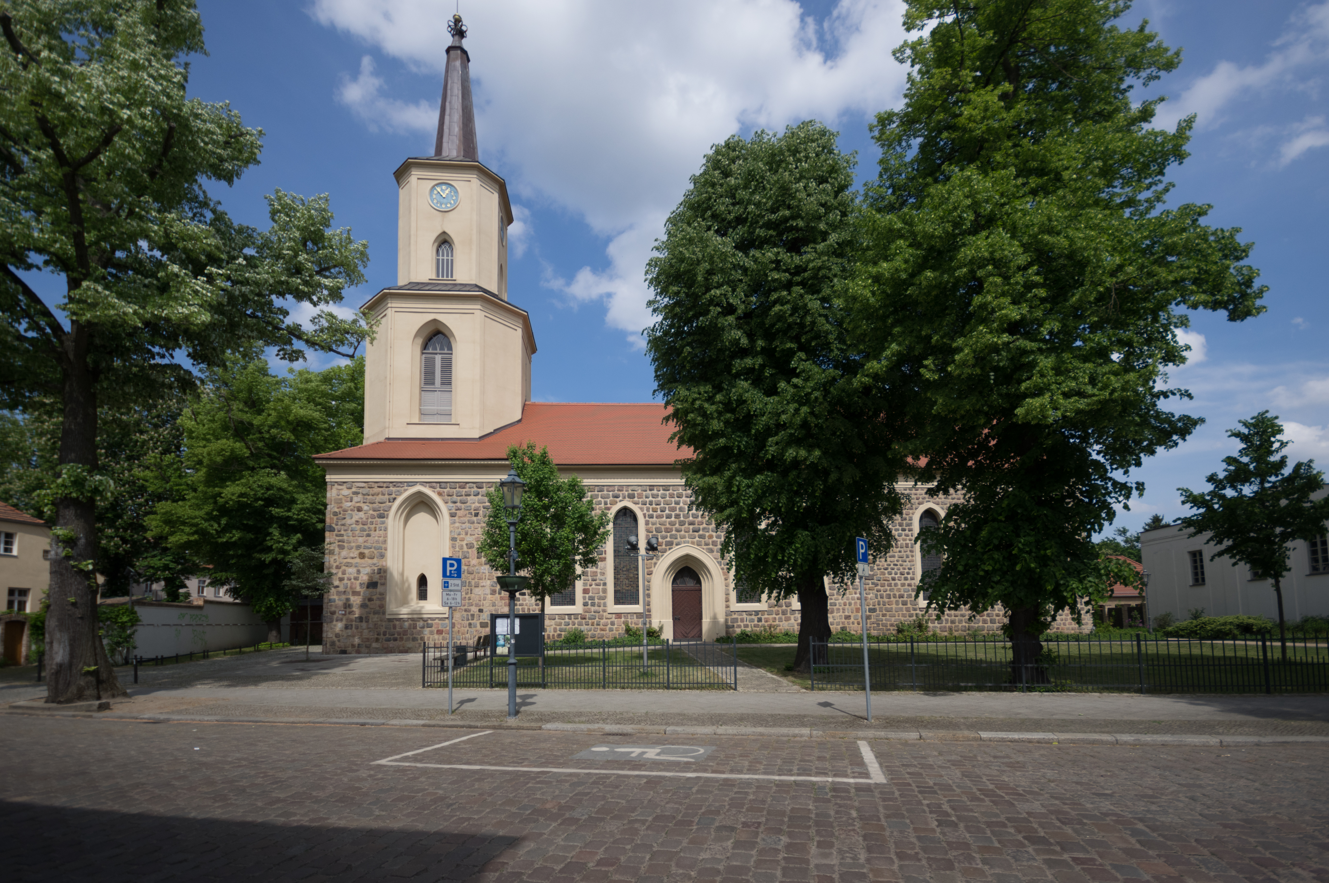 Teltow in Brandenburg. die Kirche steht unter Denkmalschutz.